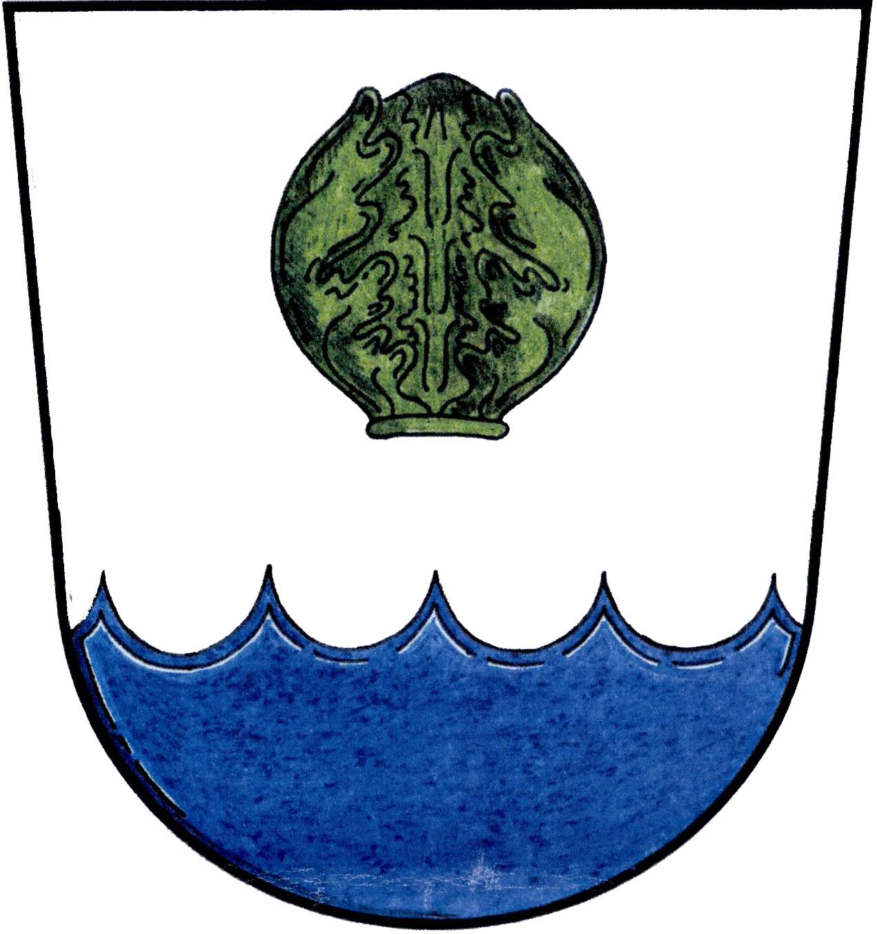 Česky: znak obce Roudné